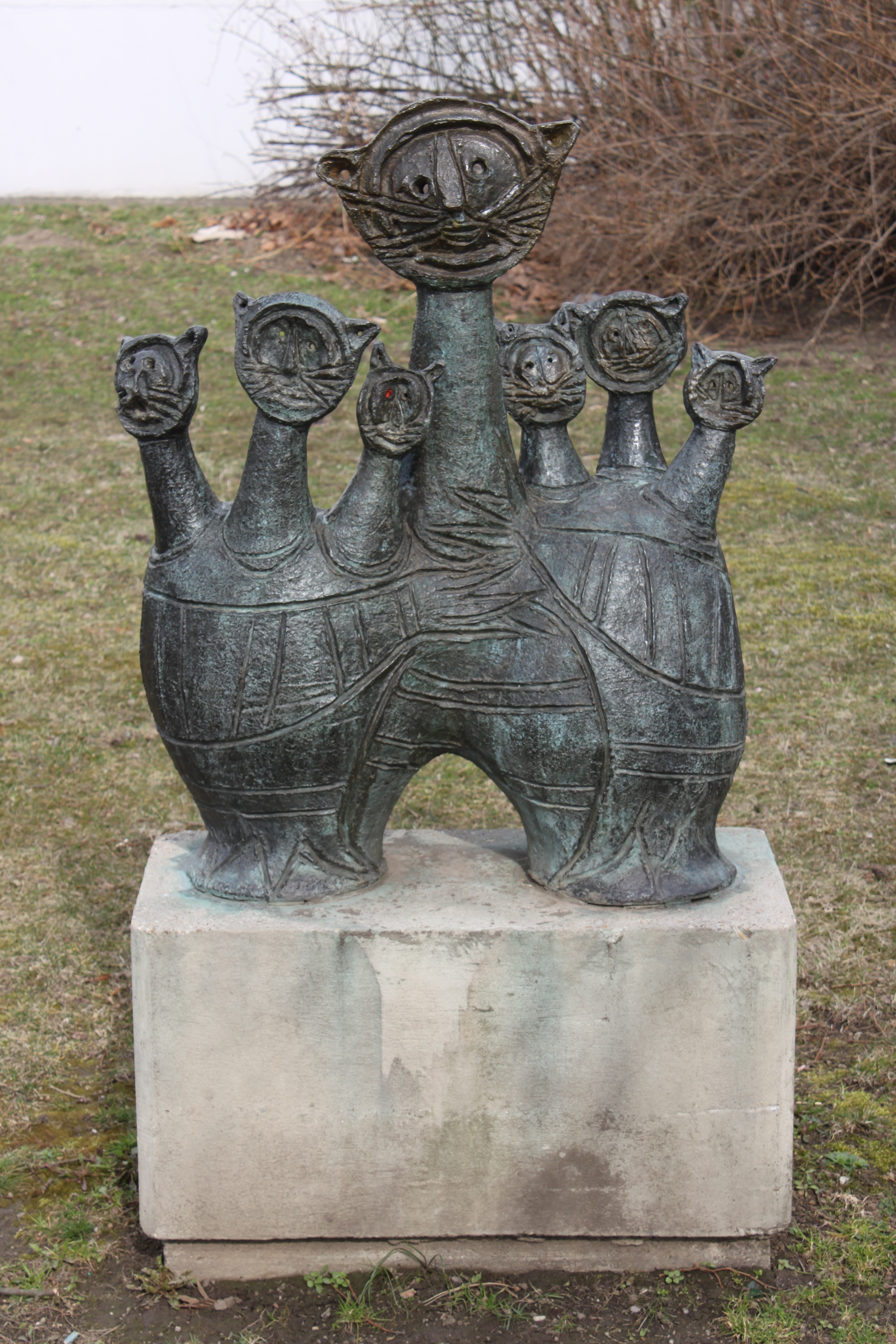 Bronzeplastik von Maria Bilger aus dem Jahr 1969 vor der Volksschule Tomaschekstraße 44 im Gemeindebau Autokaderstraße 3-7 in Wien This media shows the Vienna residential building (Gemeindebau) with the ID 514.